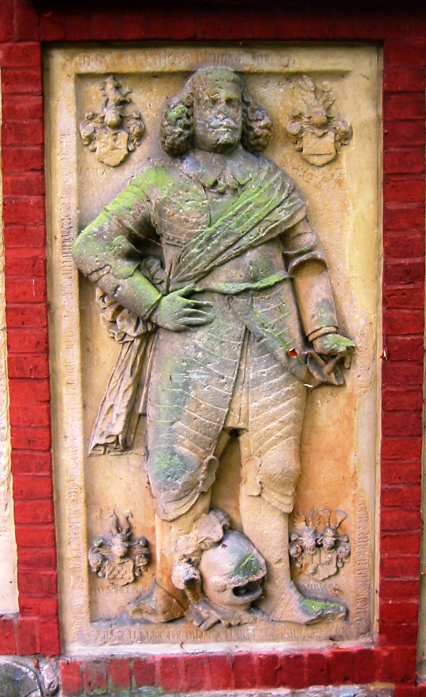 Epitaph mit Nickel von Langen aus 1599 an der Ostseite der Kirche in Münchehofe der gleichnamigen Gemeinde im Landkreis Dahme-Spreewald in Brandenburg